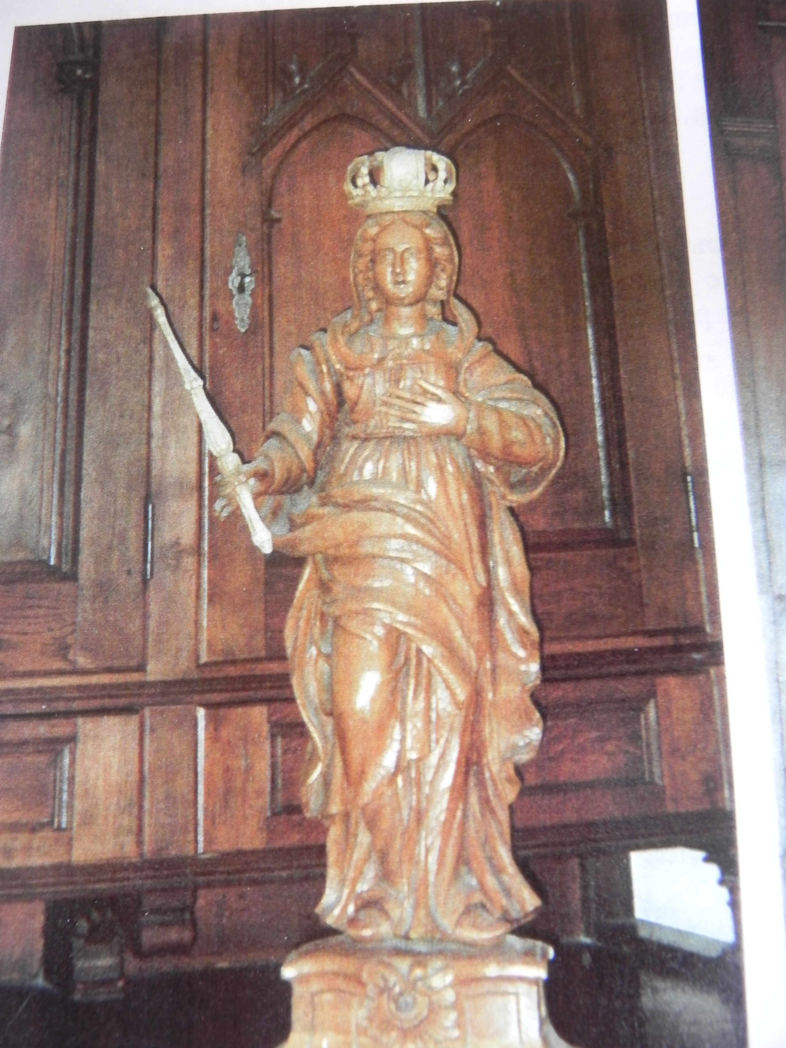 Statue de la Vièrge Marie